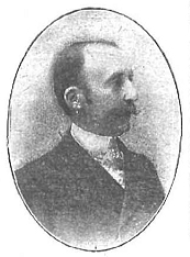 Retrato de Enrique Aguilera y Gamboa, publicado en la revista española Nuevo Mundo.